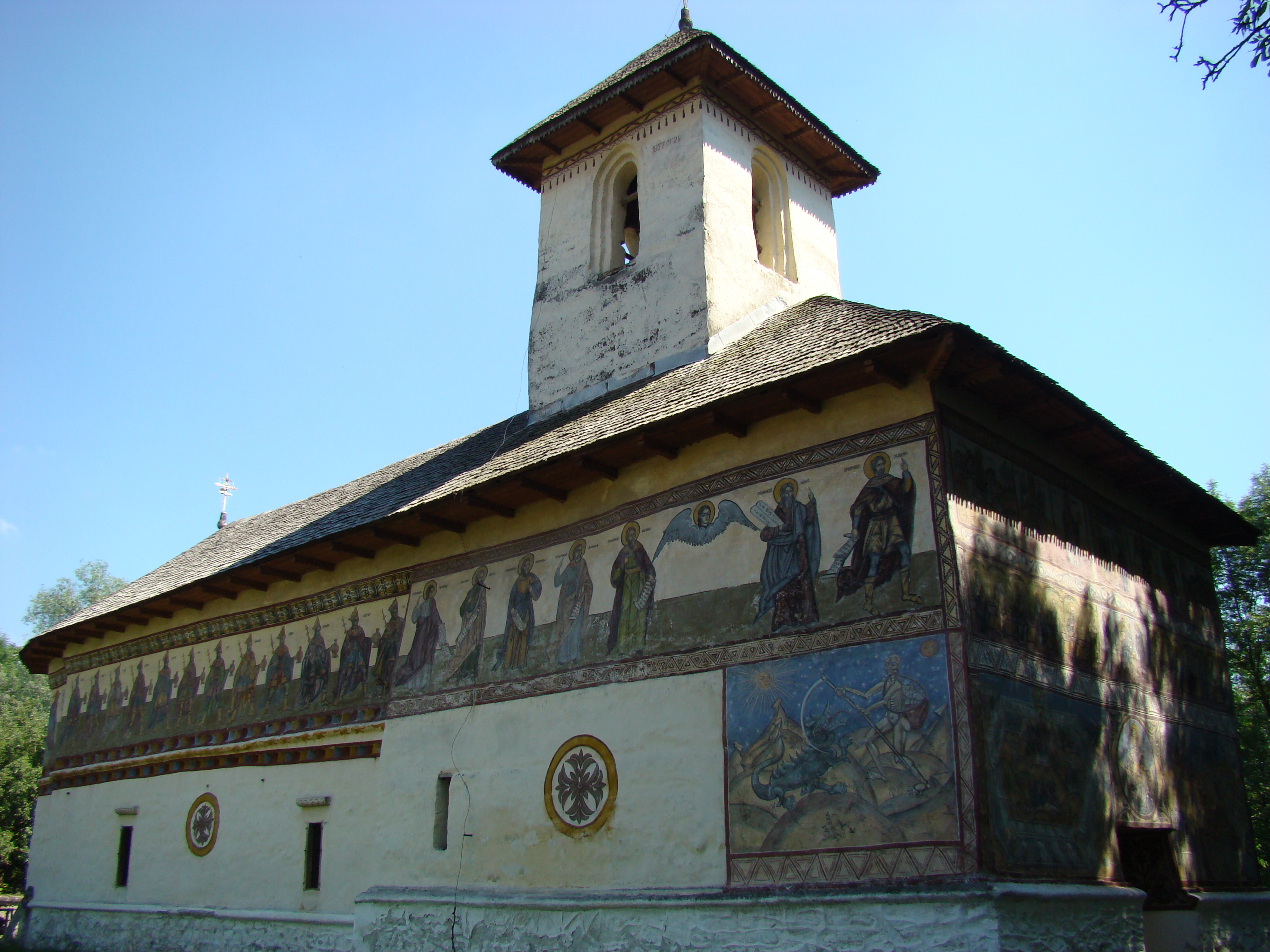 Biserica monument „Buna Vestire” din Oteșani, județul Vâlcea